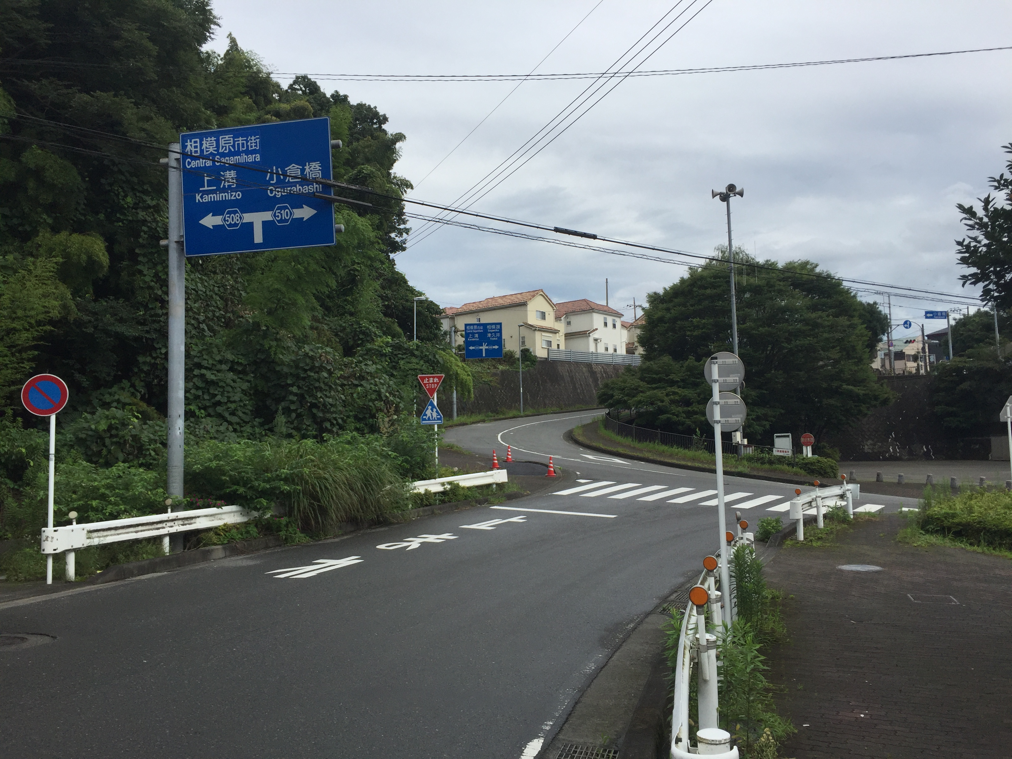 県道508号・510号線交点（相模原市緑区久保沢）。510号線旧道・小倉橋方面は右折。